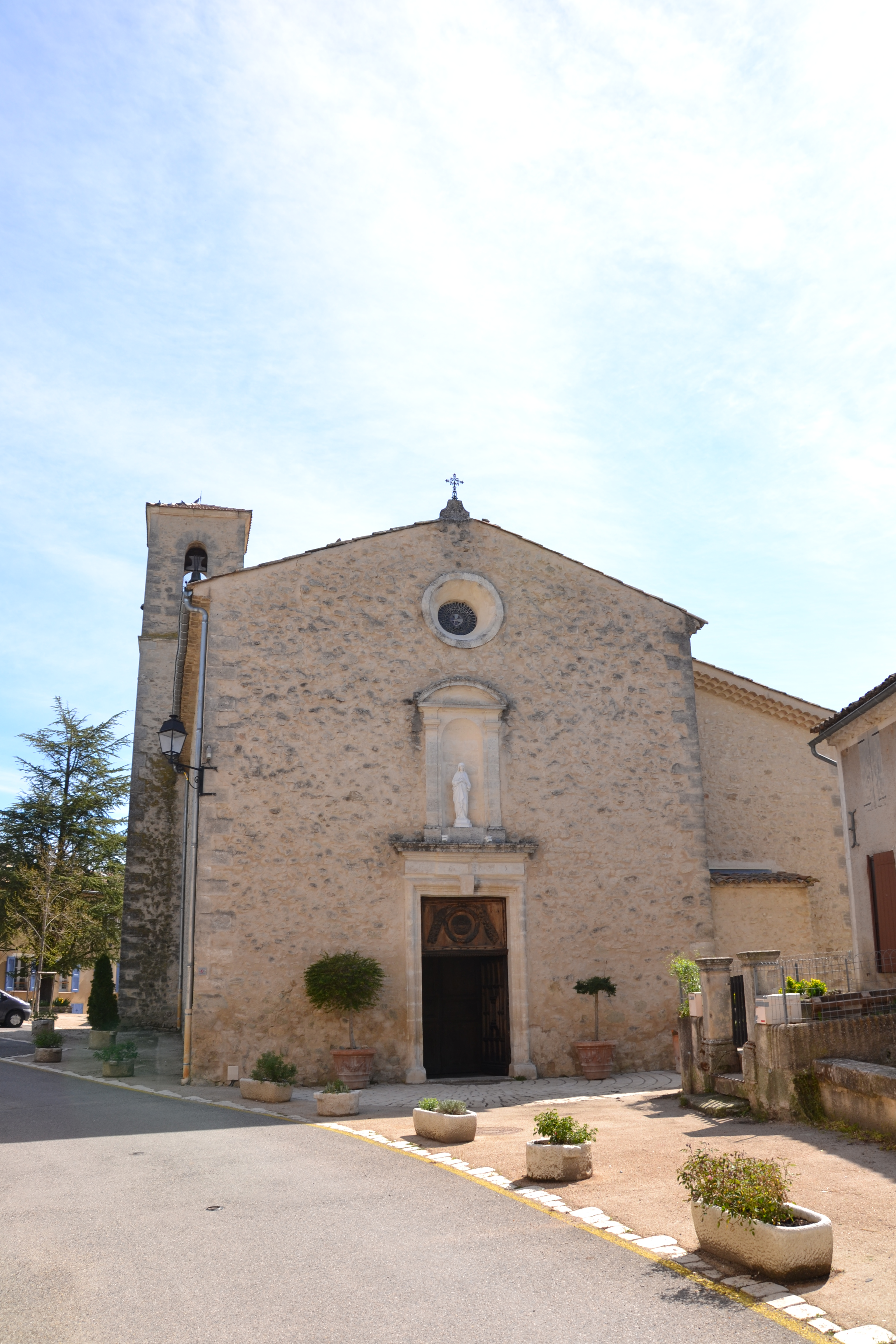 Église St-Étienne Martyr , commune de Niozelles, dans les Alpes-de-Haute-Provence